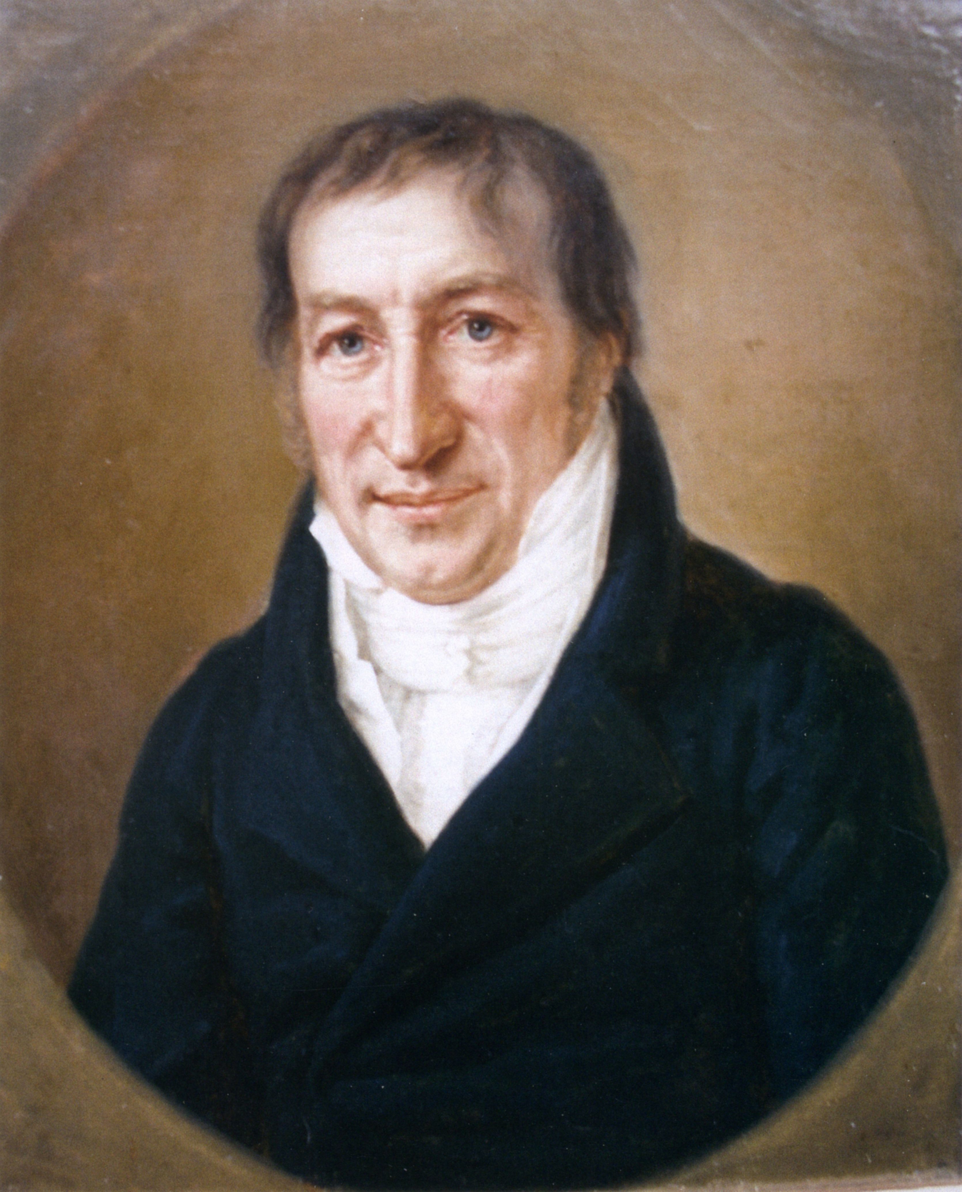 Christian Zais 1770–1820, nassauischer Baubeamter, Architekt, Stadtplaner und Kurunternehmer in Wiesbaden. Öl auf Leinwand, unbekannter Künstler, um 1815. Privatbesitz der Familie Zais.